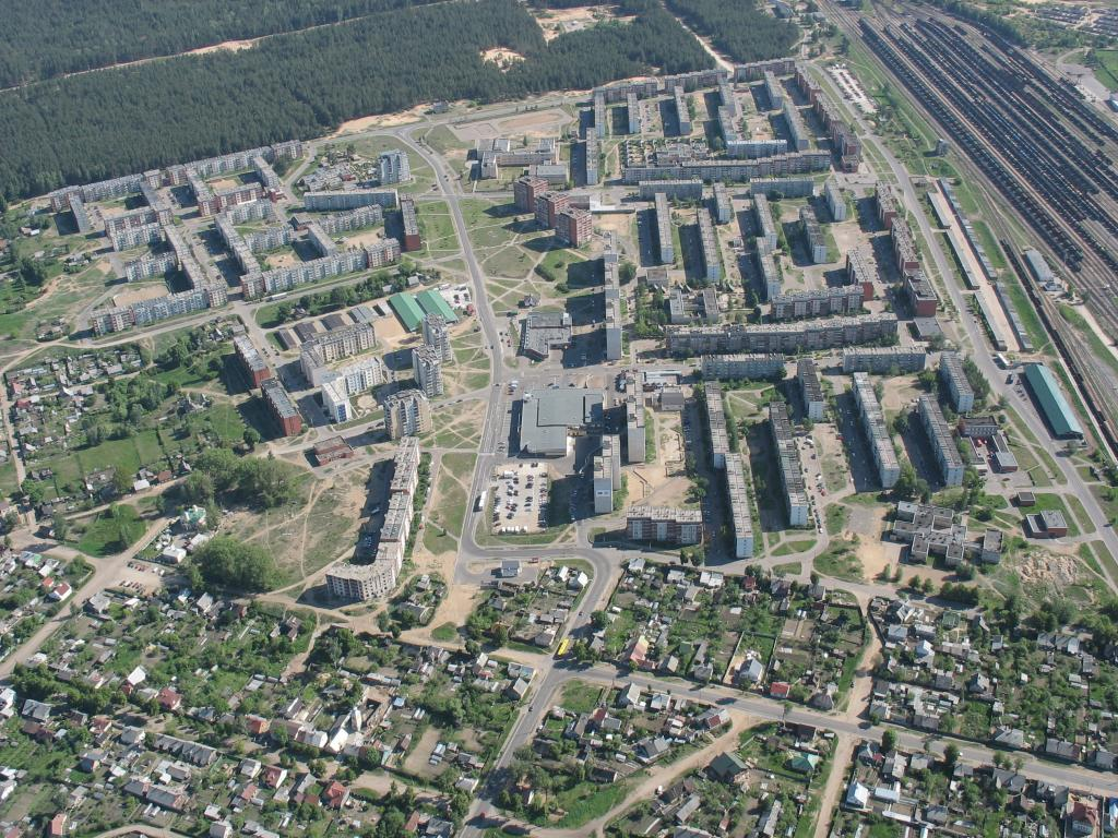 Вид с верху